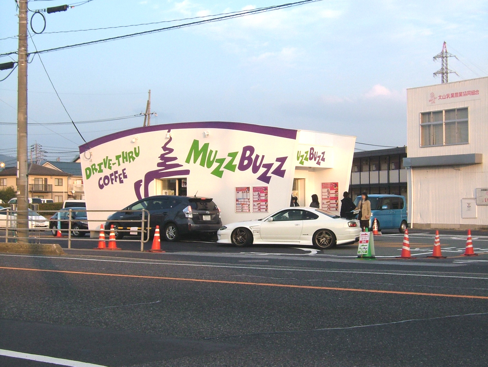 マズバズ鳥取店